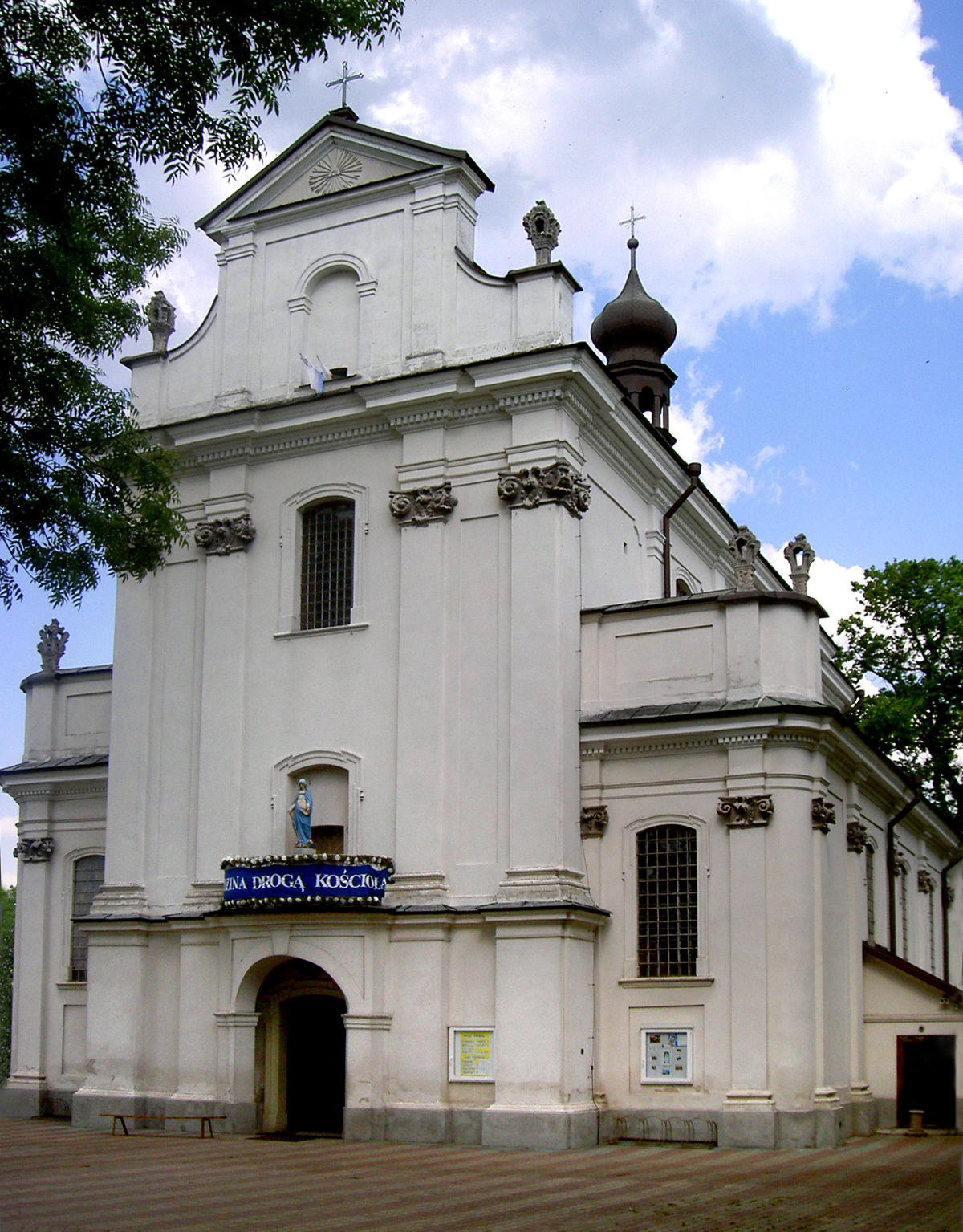 Tarnogród, Poland Parish Church / Kościół parafialny